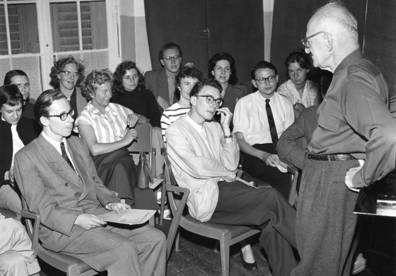 Juli 1957 12. Internationale Ferienkurse für neue Musik, Darmstadt Klavierseminar Prof. Edward Steuermann